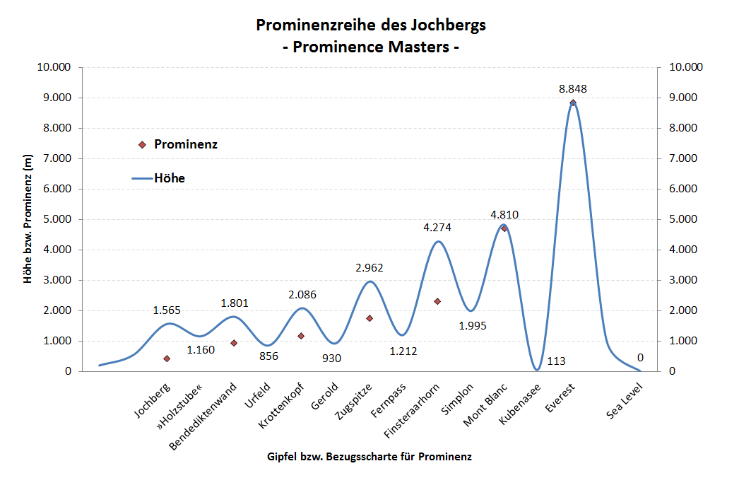 Prominenzreihe der Prominence Masters für den Jochberg in den Bayerischen Voralpen. Die Schartenhöhe oder Prominenz eines Gipfels ergibt sich als Differenz aus seiner Höhe und der der höchstgelegenen Einschartung (Bezugsscharte), bis zu der man mindestens absteigen muss, um einen höheren Gipfel zu erreichen. Der Prominence Master ist der der Bezugsscharte nächstliegende prominentere Gipfel, den man über diese Scharte erreichen kann, ohne tiefer absteigen zu müssen. Er ist stets höher als der Ausgangsgipfel selbst.